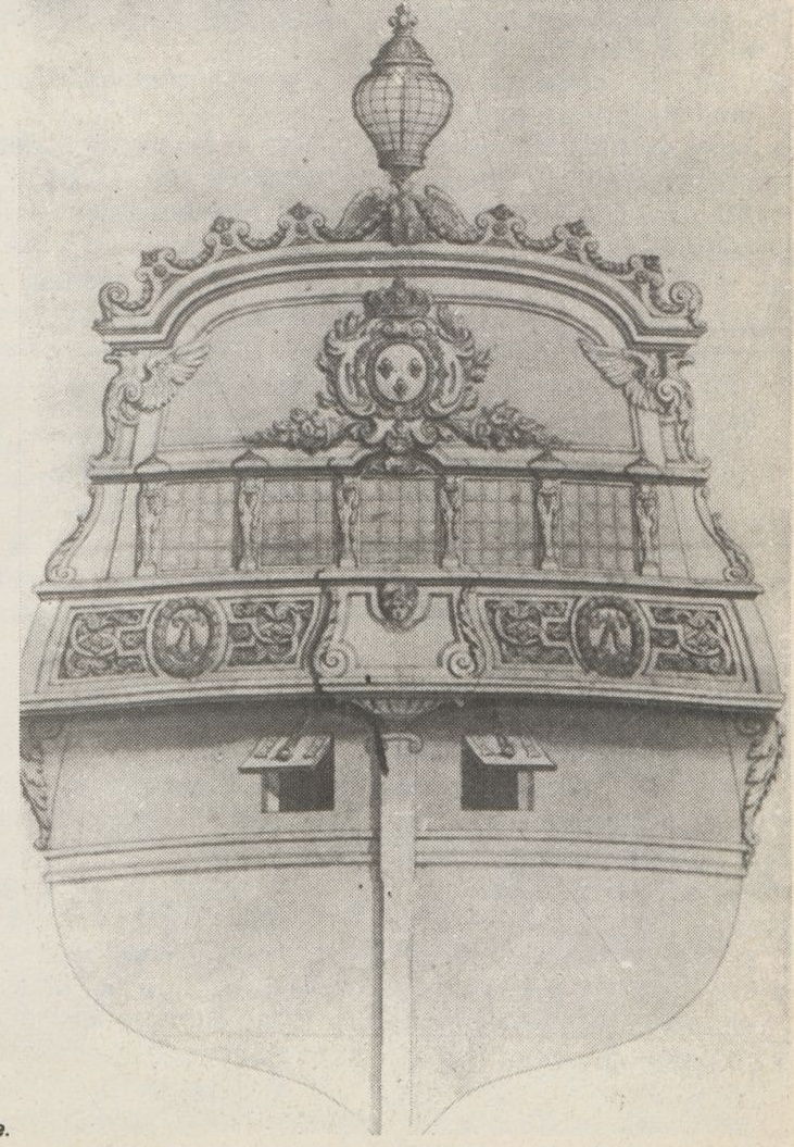 L'Aigle, de 36 canons, lancé en 1692 à Bayonne. Vaisseau de cinquième rang du niveau de la frégate. Vaisseau utilisé en 1692-1694 par le corsaire basque Joannis de Suhigaraychipy, dit Coursic.